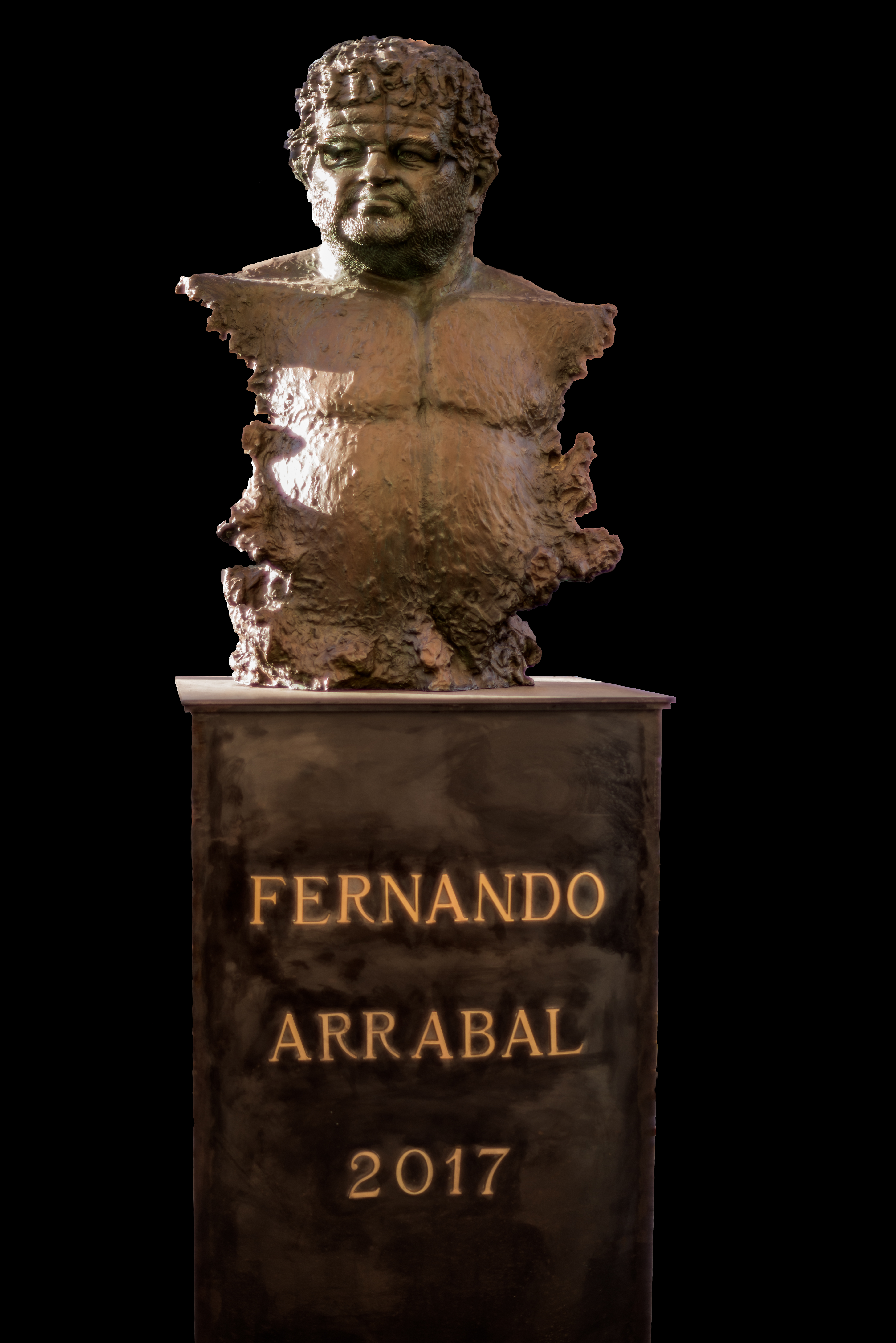 Busto de Fernando Arrabal, por Mustafa Arruf. 1994-2002-2017. Localizado en la Avenida Cándido Lobera, frente a la fachada principal del Teatro Kursaal-Arrabal [1]. Melilla.